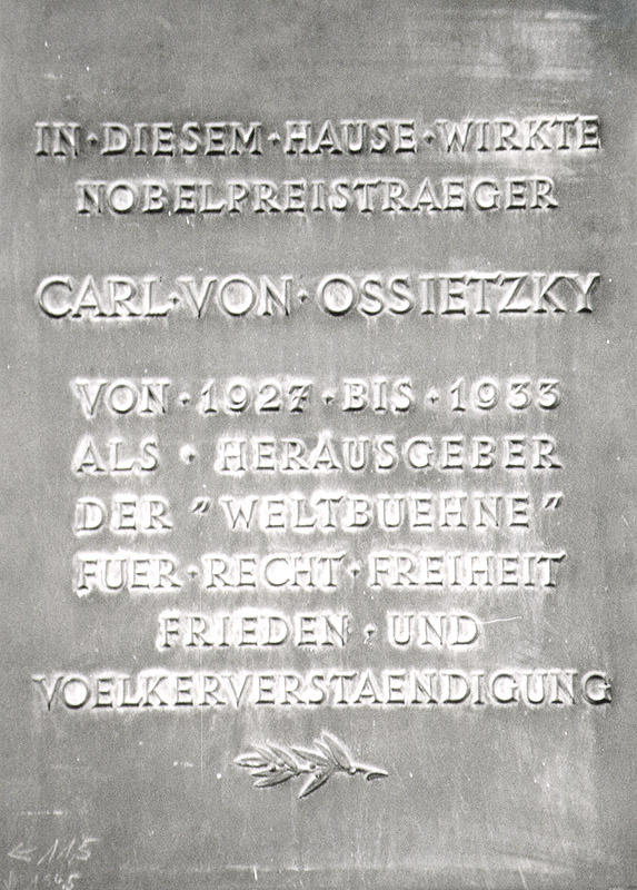 Gedenktafel für Carl von Ossietzky am Haus Kantstraße 152, Berlin-Charlottenburg. Dort befand sich von 1927 bis 1933 die Redaktion der Zeitschrift "Die Weltbühne".